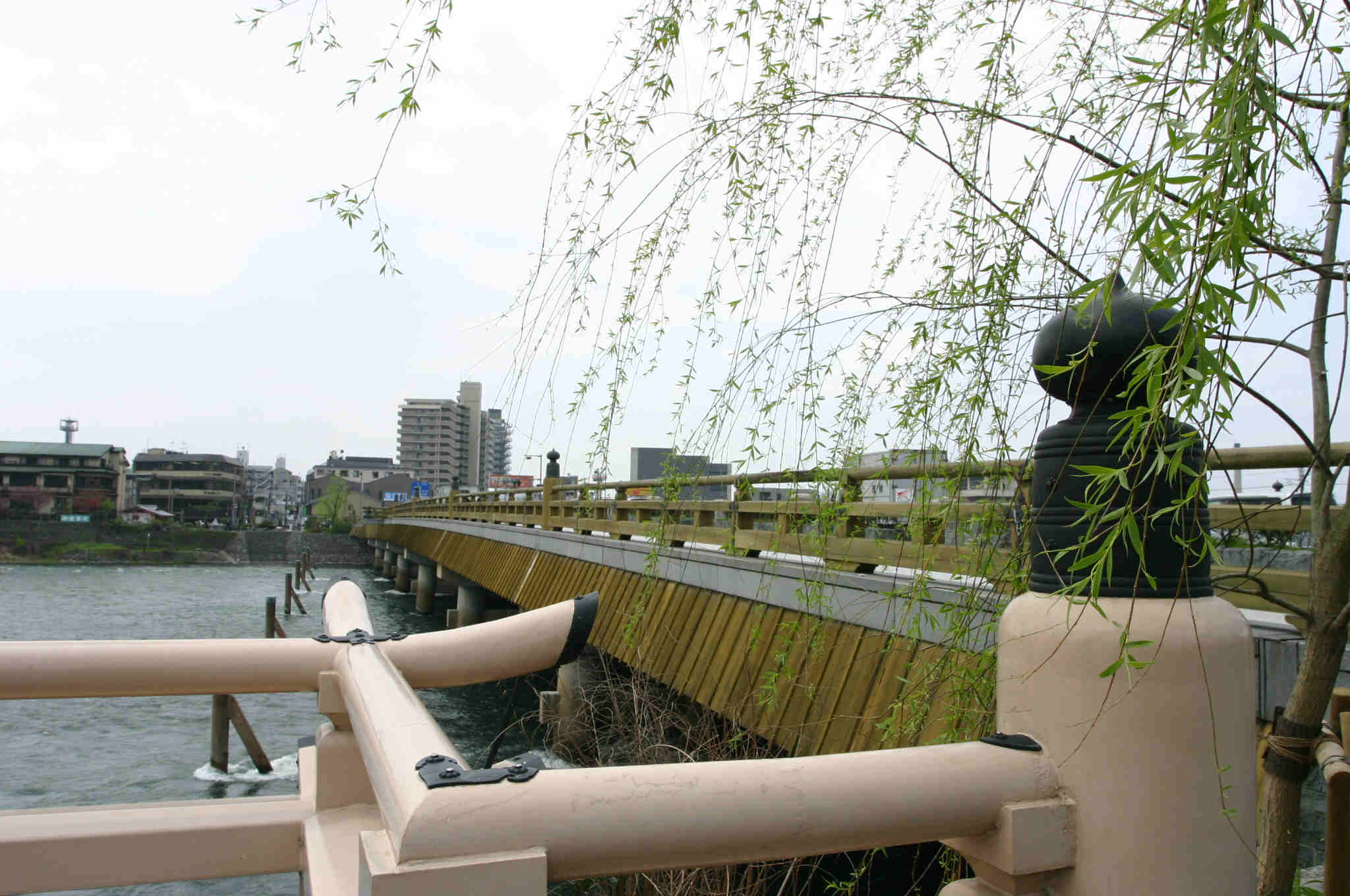 Uji bridge